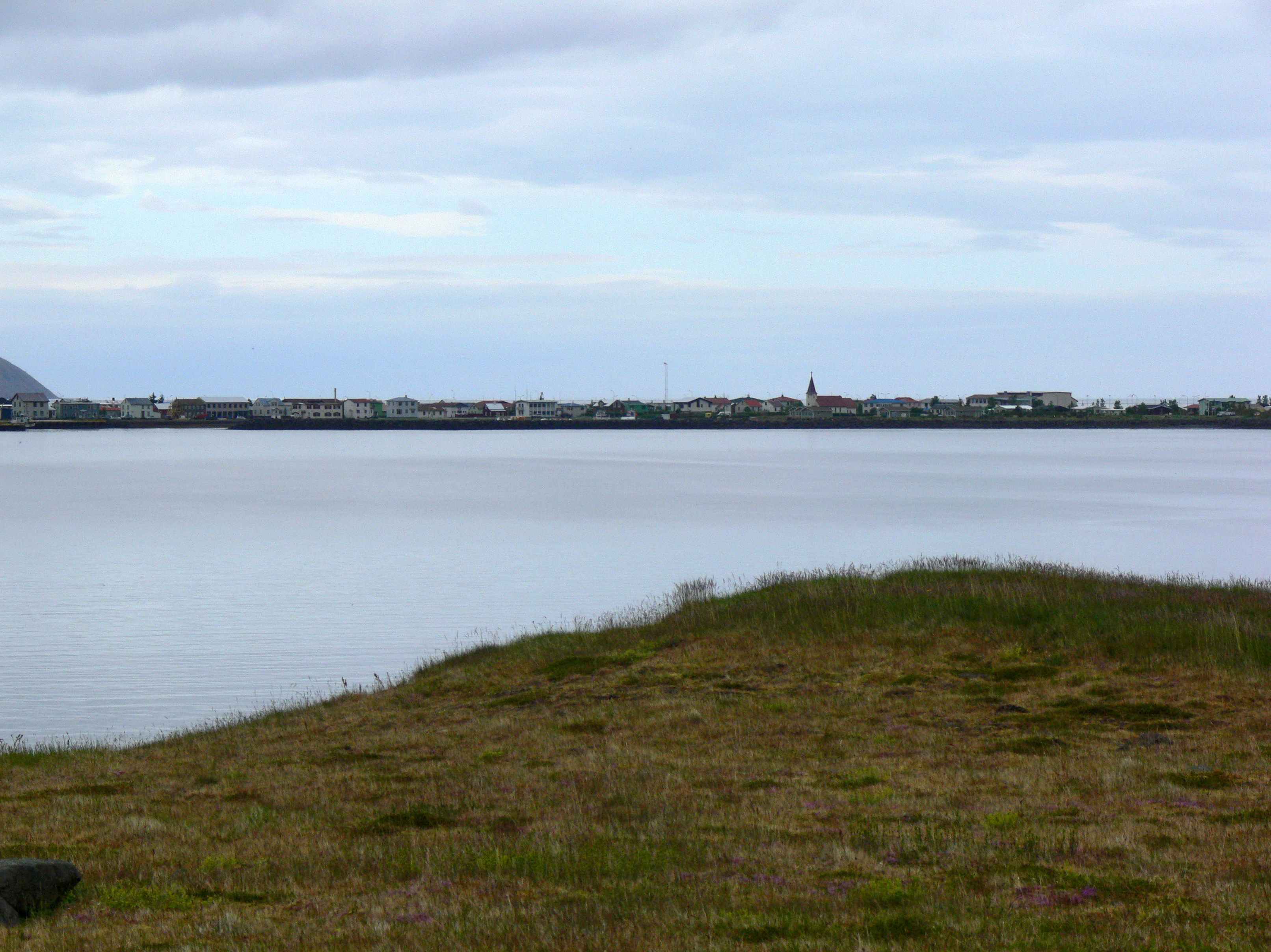 Önundarfjörður. Im Hintergrund Flateyri.